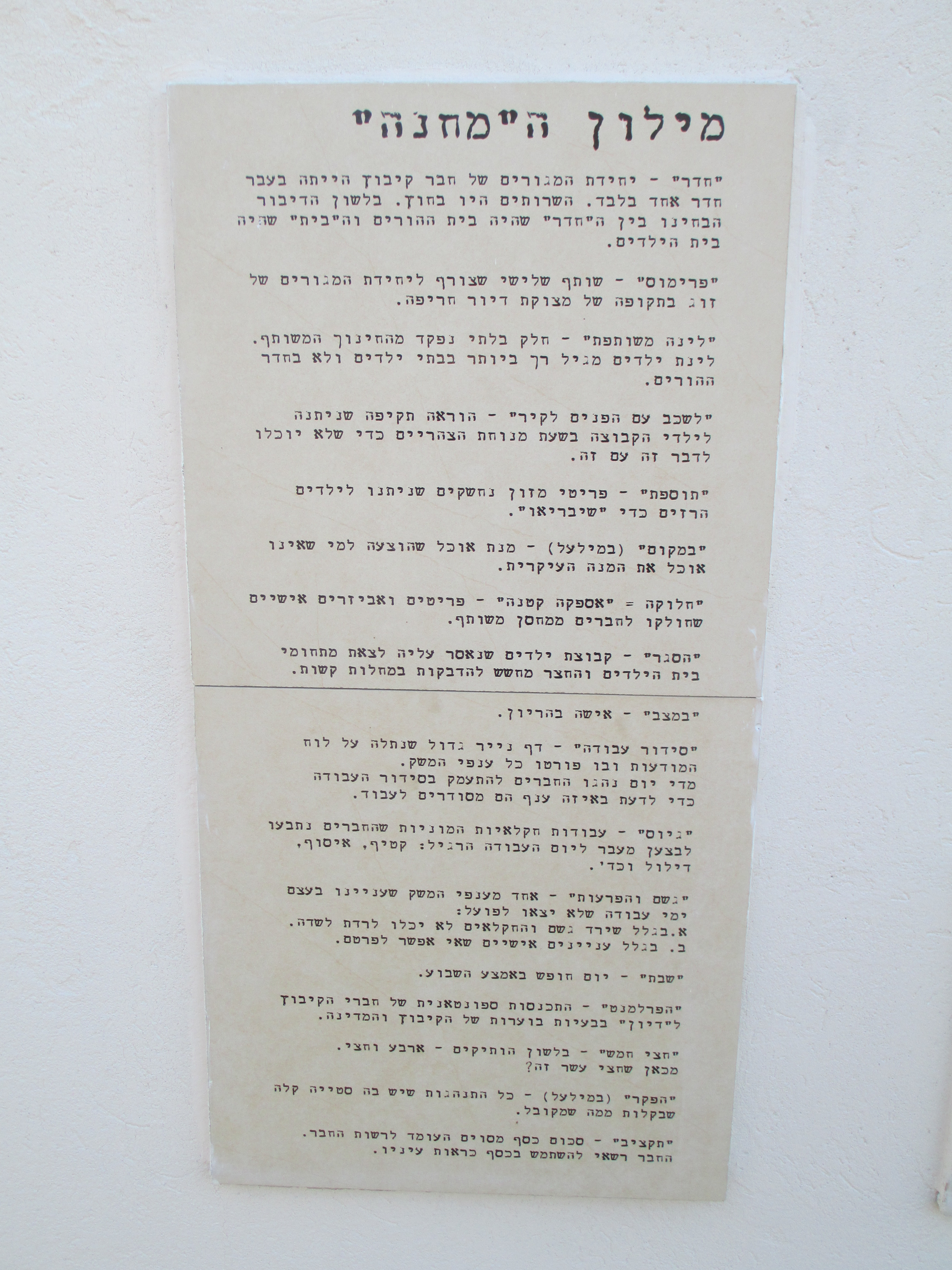 מילון מונחי קיבוץ בשפיים